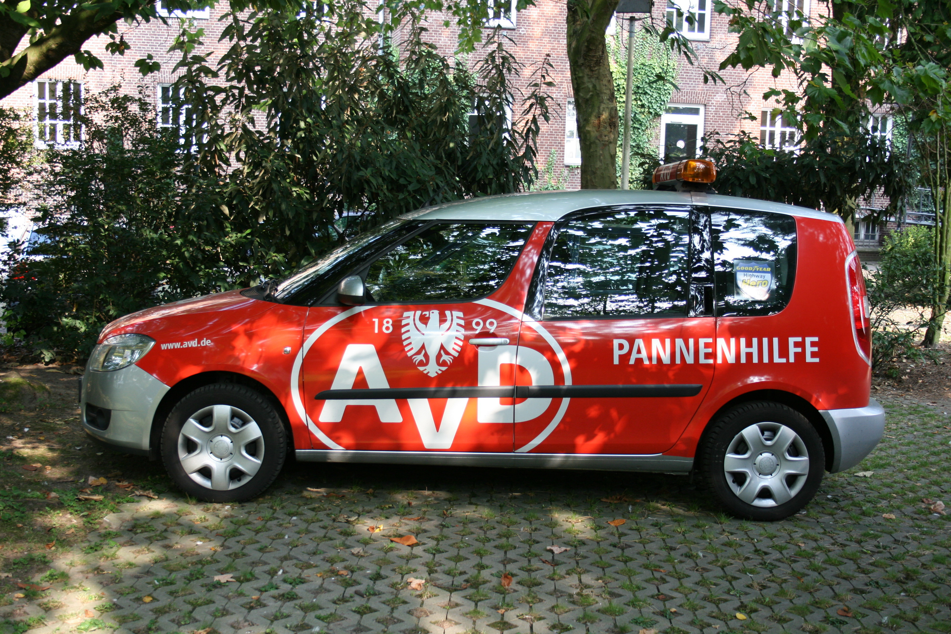 AvD-Pannenhilfe